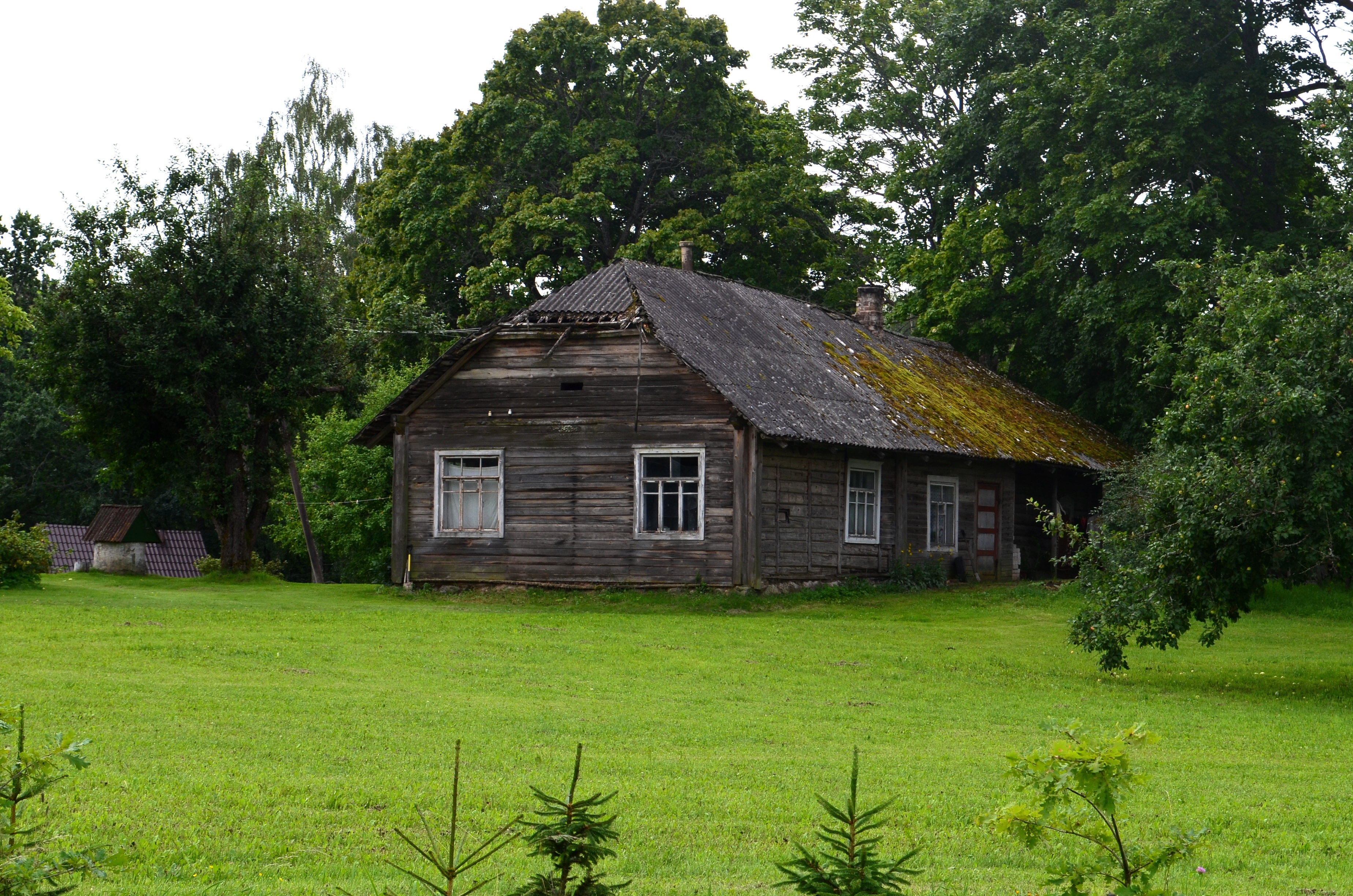 Mozūriškės k., Ignalinos raj.